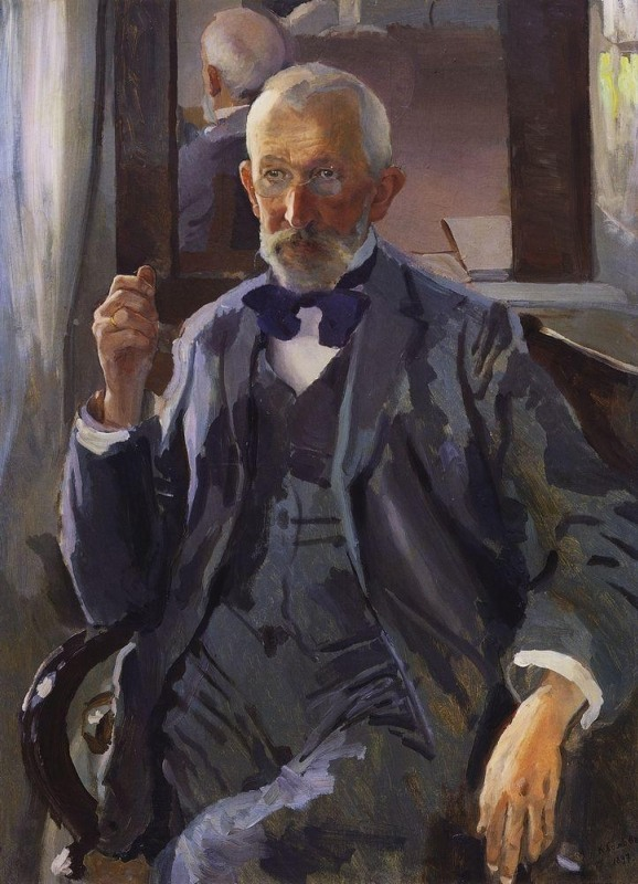 Портрет А.И.Сомова, отца художника. 1897